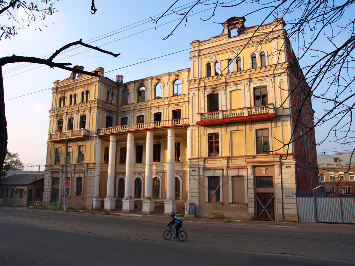 Луганськ. Будинок Васньова